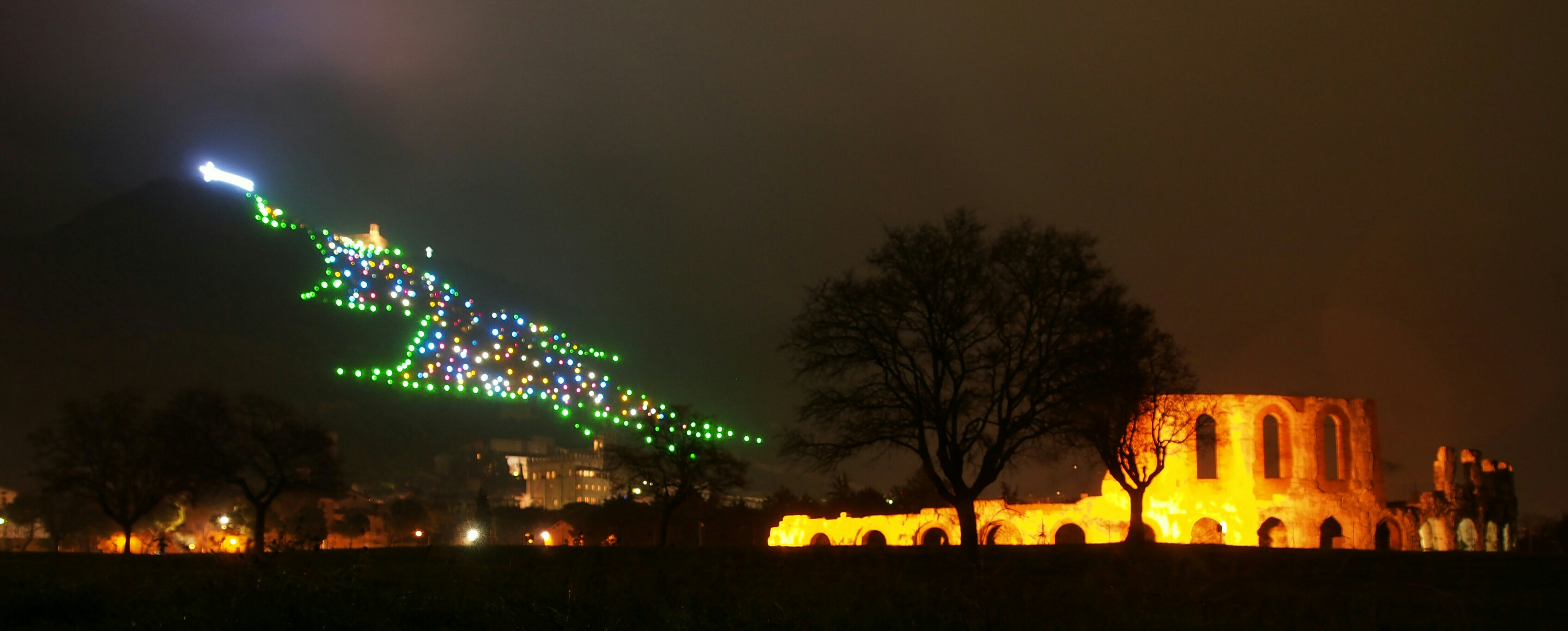 Le Sapin de Noel le plus grand du Monde 2014, Cirque romain, Gubbio, Italie